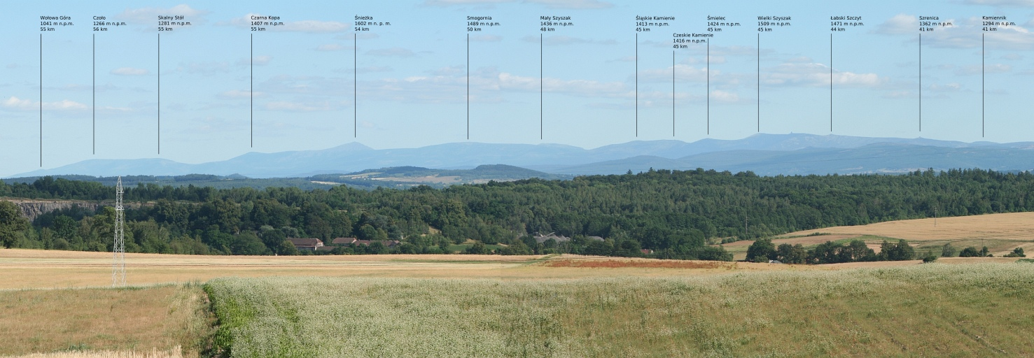 Karkonosze widziane z odległości ~50 km z Pogórza Izerskiego ""